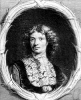 Regnier de Graaf, Dutch anatomist.